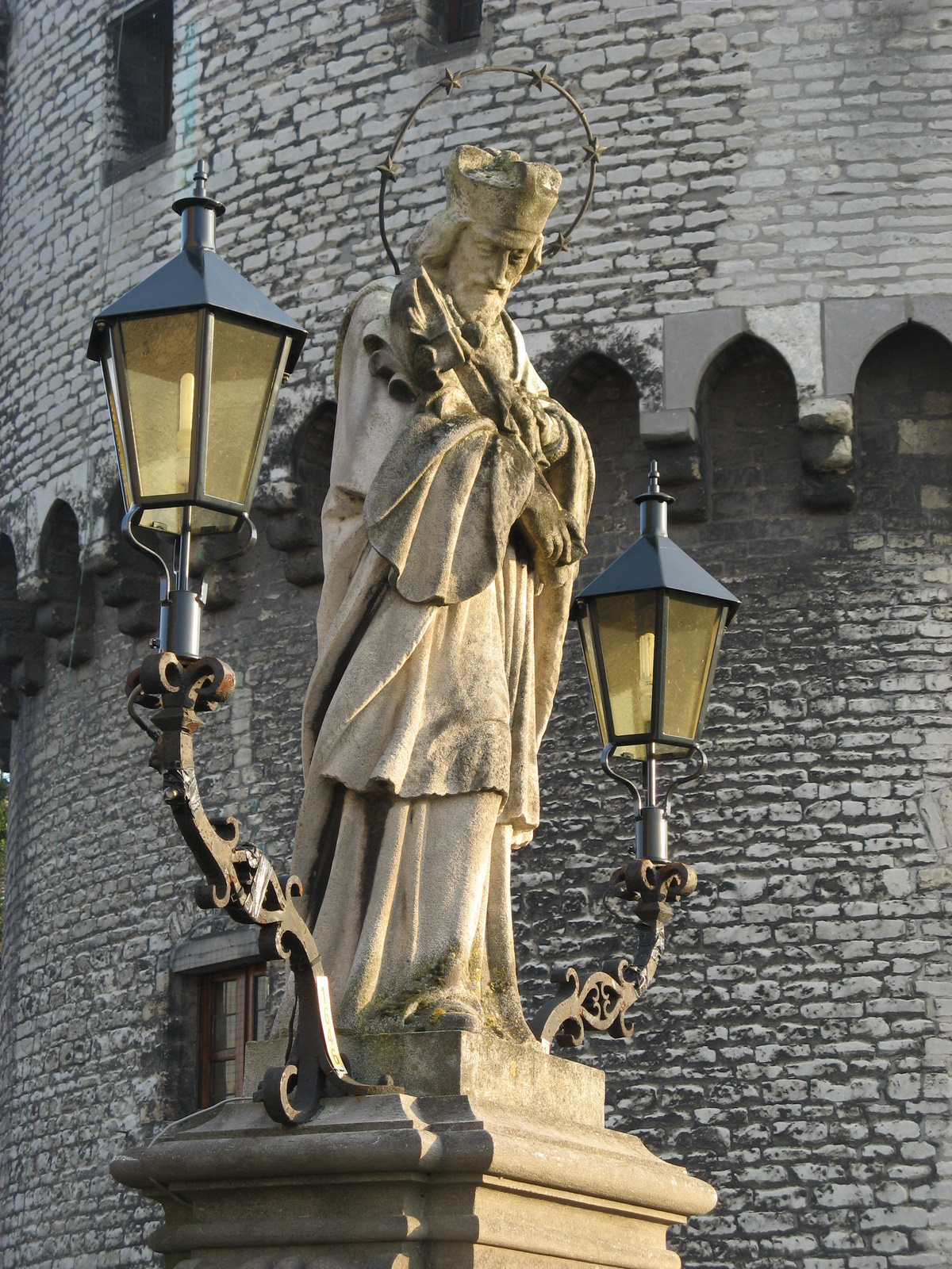 John of Nepomuk Statue, Broel Towers, Kortrijk, Belgium